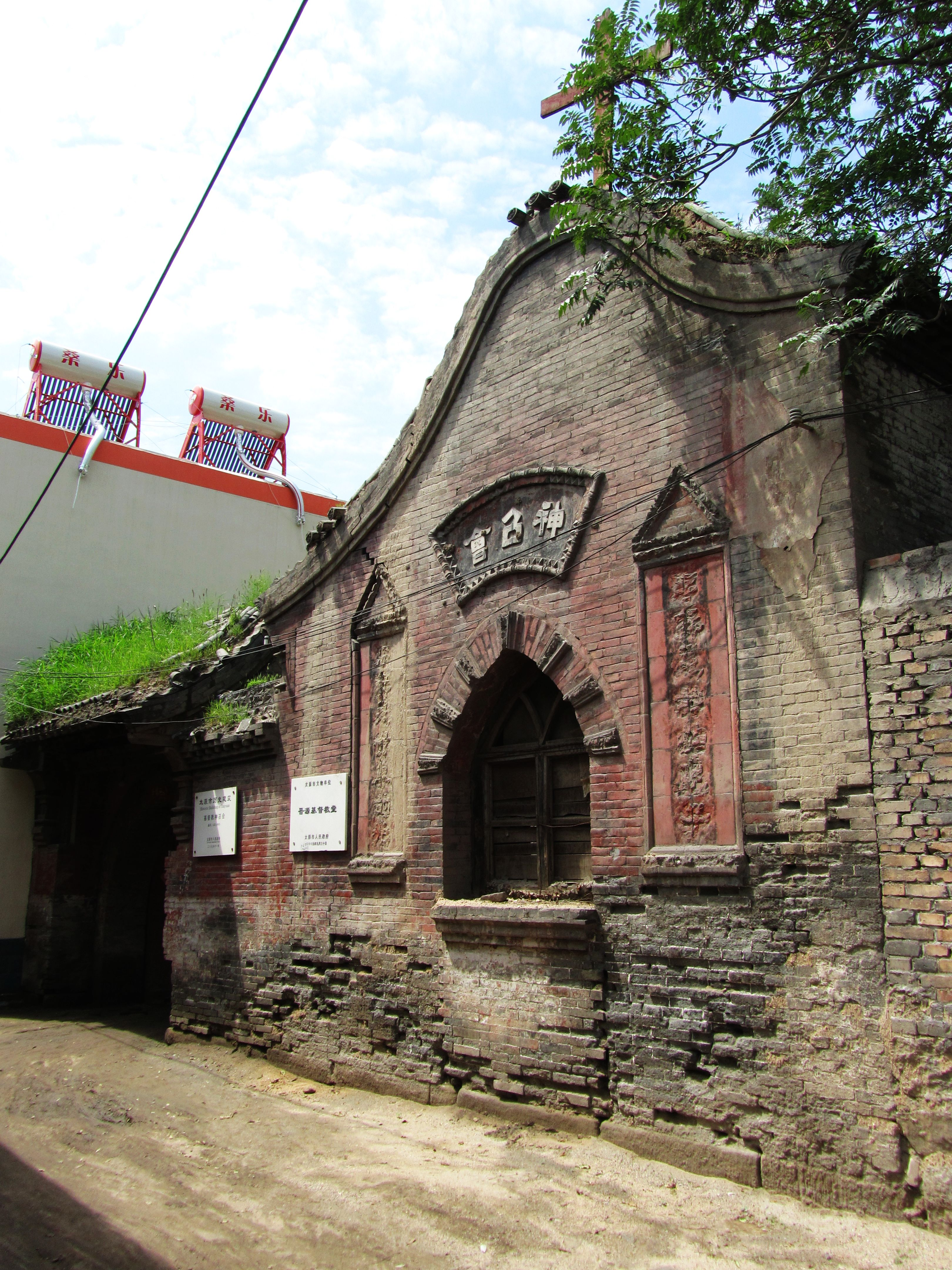 太原市晋源区基督教神召会旧址。